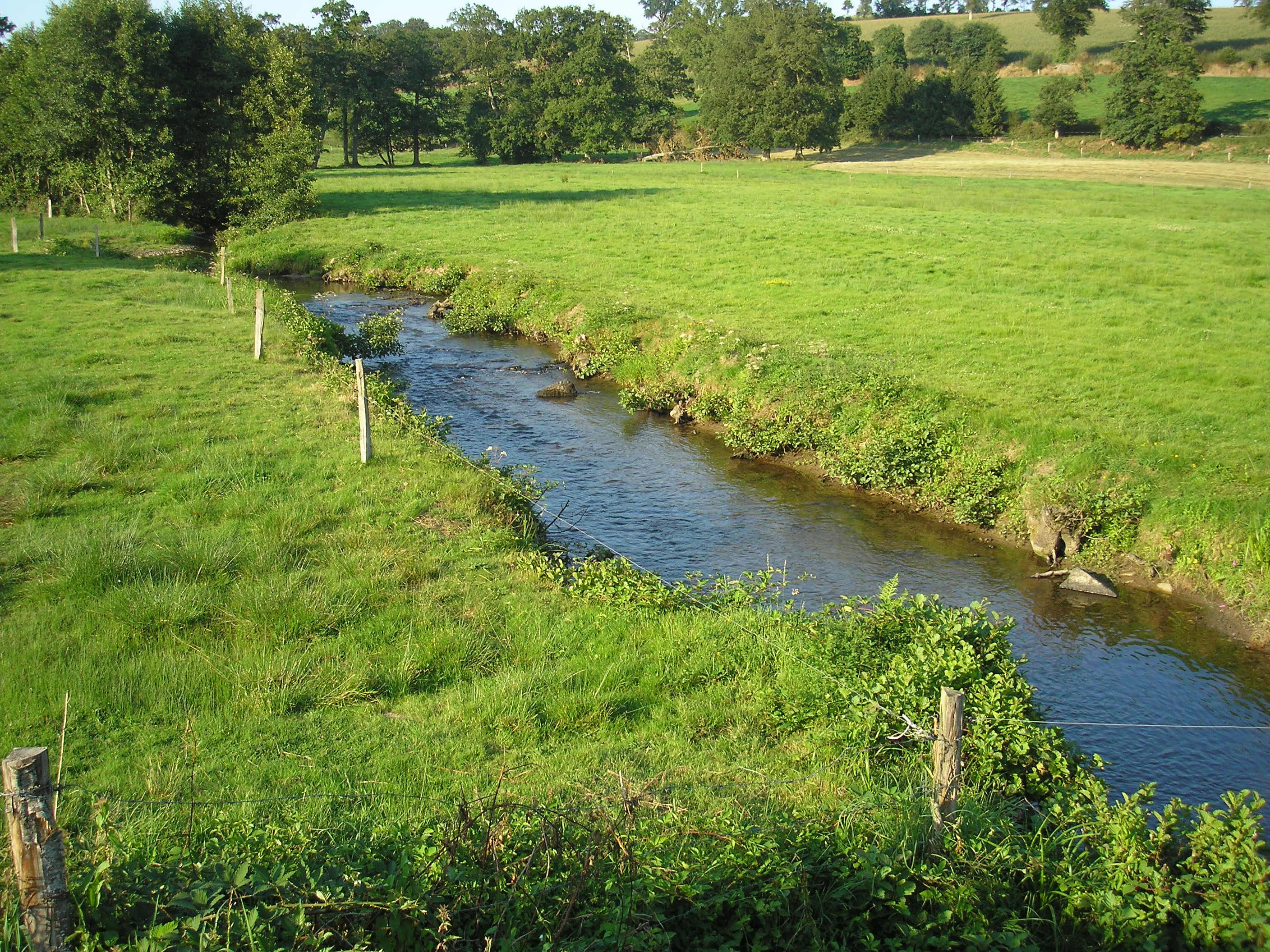 L'Égrenne entre Lonlay-l'Abbaye et Beauchêne, après la confluence du ruisseau de Froidebise (Normandie, France).